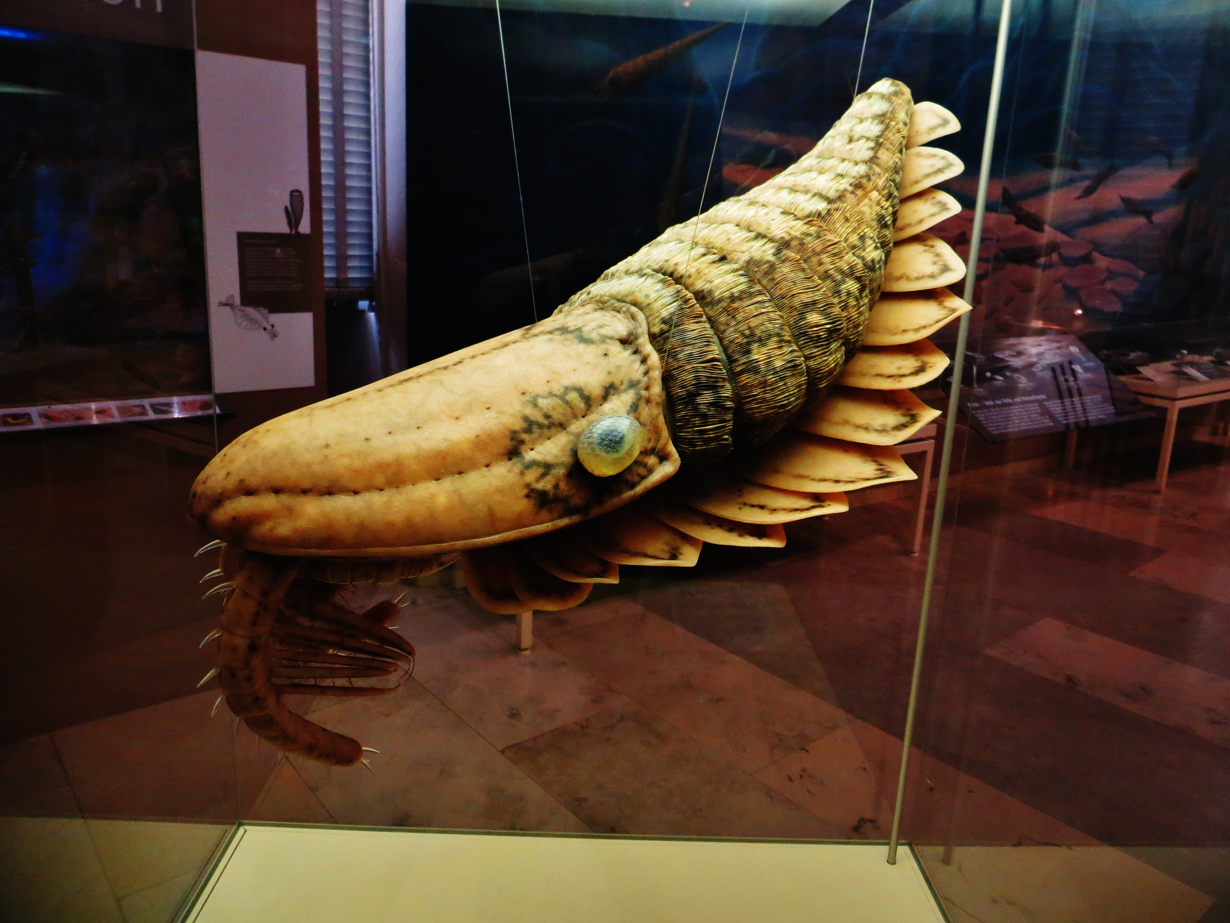 Model - Took the picture at Museum of Natural History, Karlsruhe